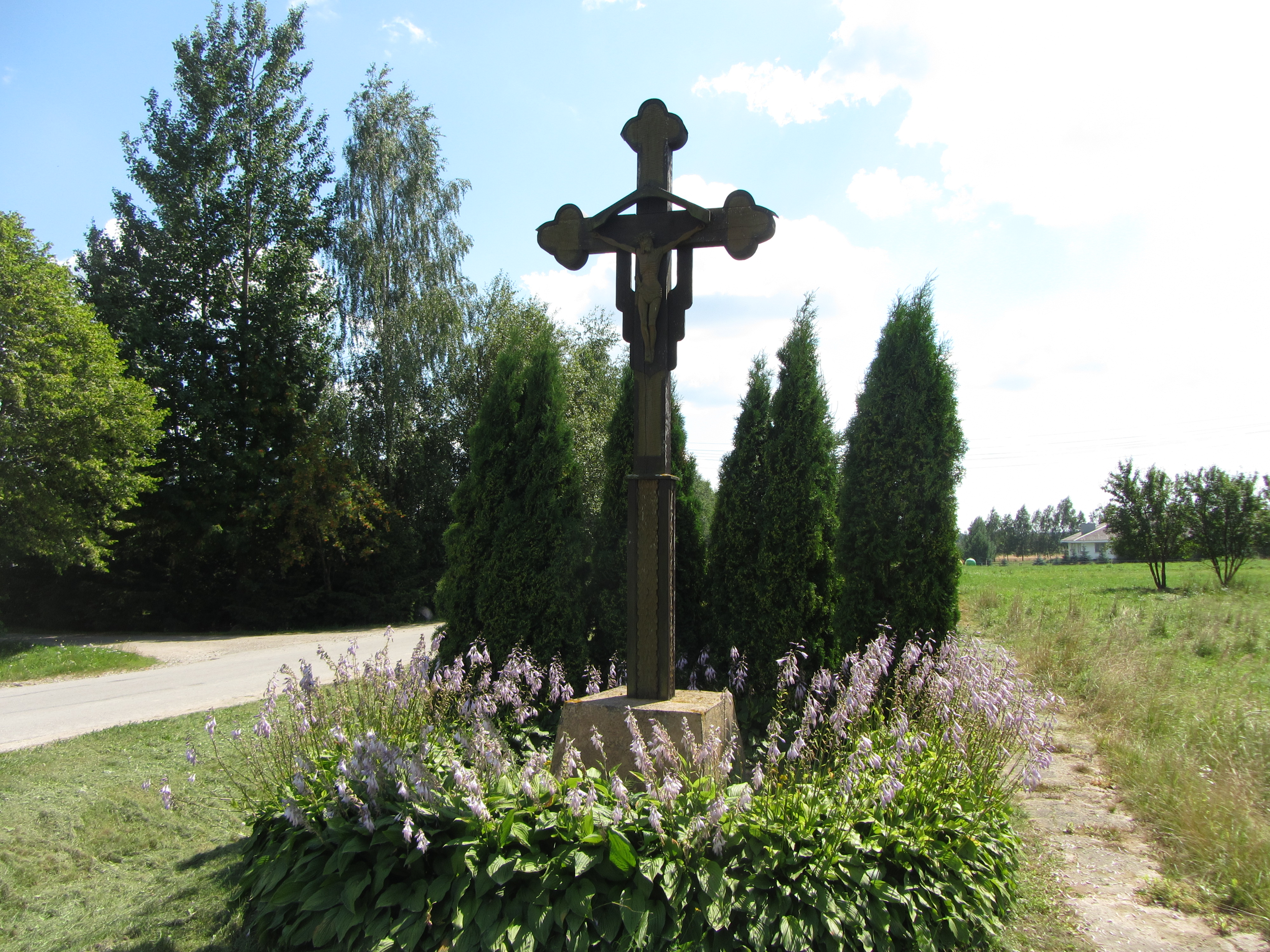 Družai 19105, Lithuania